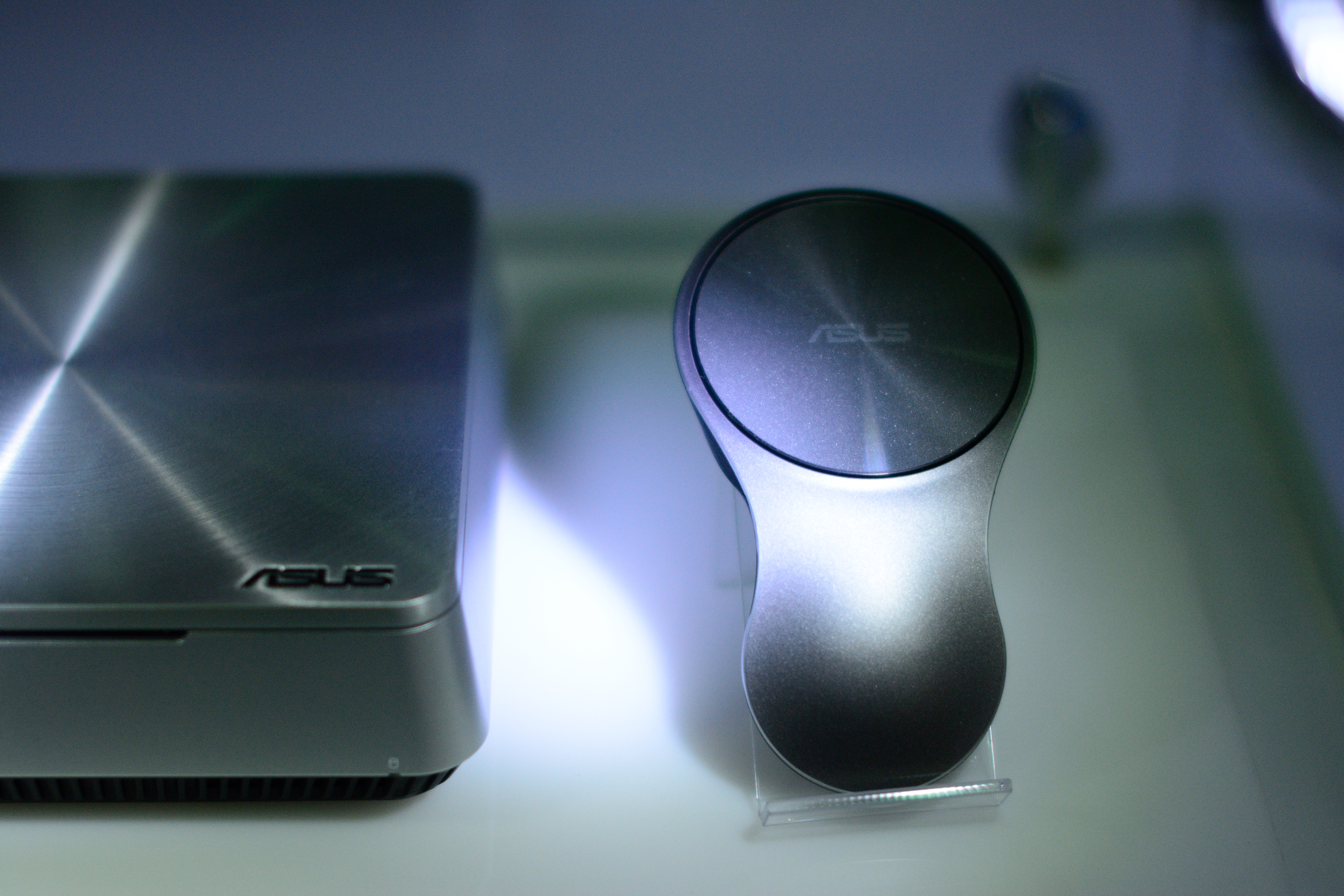 中文（台灣）: 2013台北國際電腦展覽會，華碩電腦VivoMouse。